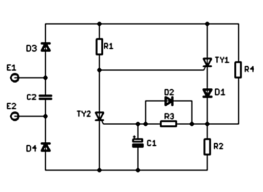 Ausführungsbeispiel eines Thyristorstarters für Leuchtstofflampen